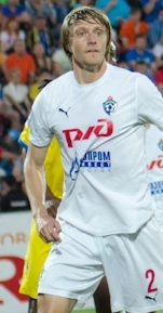 Кренделев Вячеслав игрок СКА